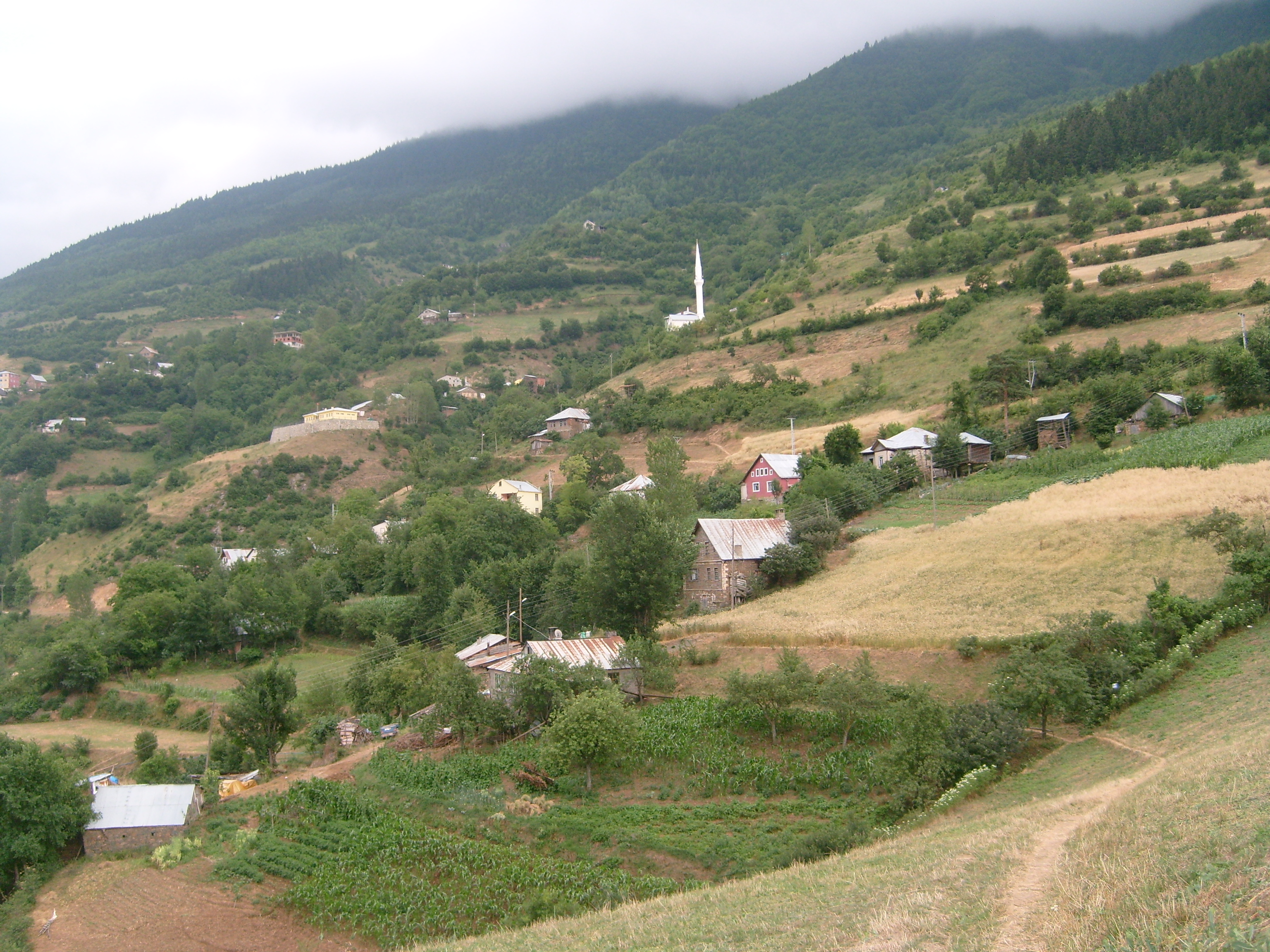 gümüşhanenin / kürtün ilçesinin / araköy köyü 2011